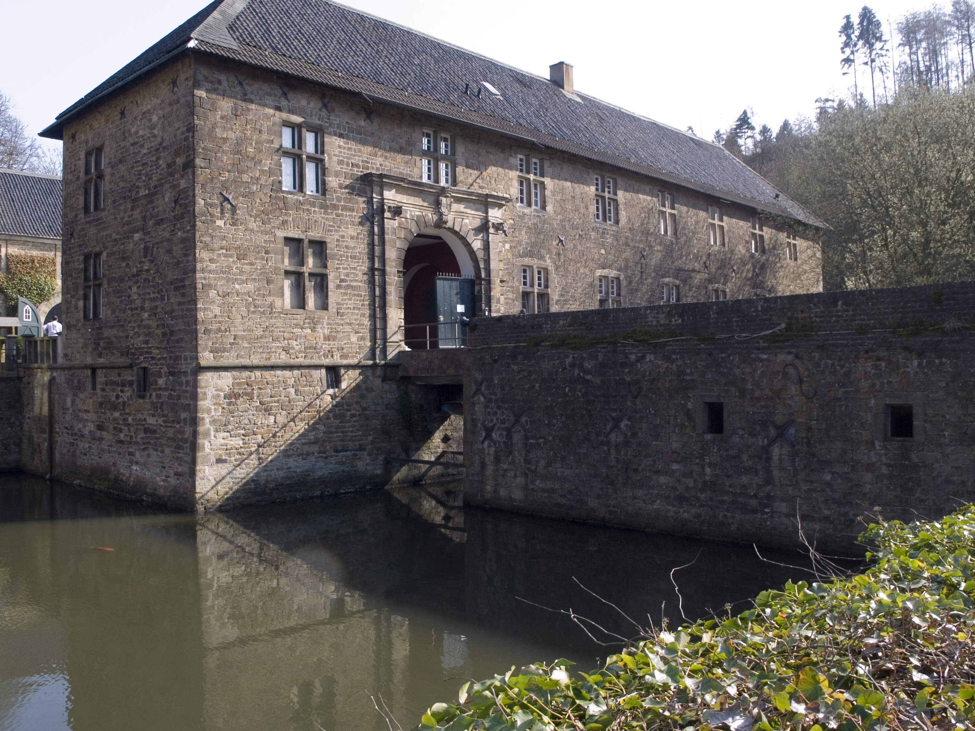 Северный Рейн - Вестфалия, Эссен, Кеттвиг - замок Гугенпот (внутренний предзамок)